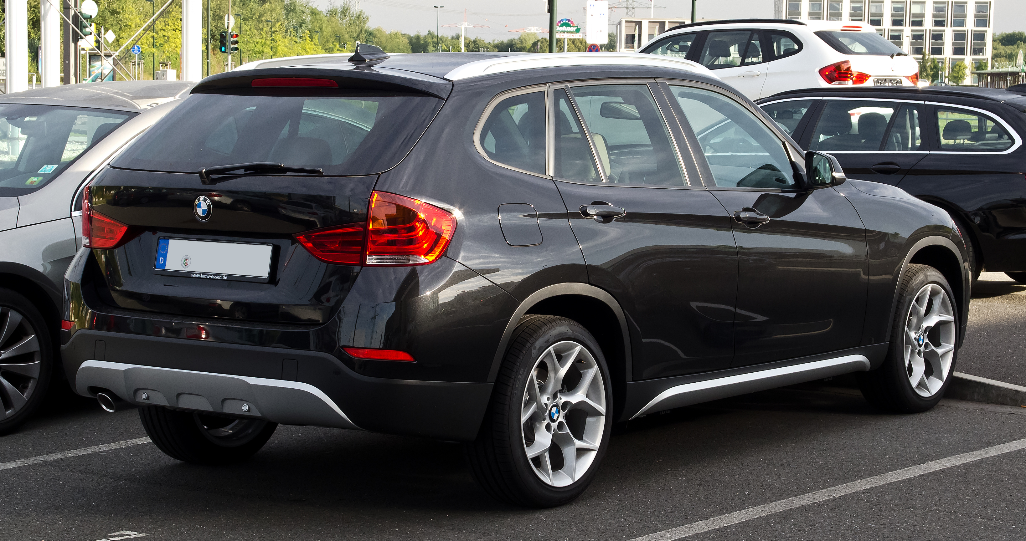 BMW X1 (E84, Facelift)